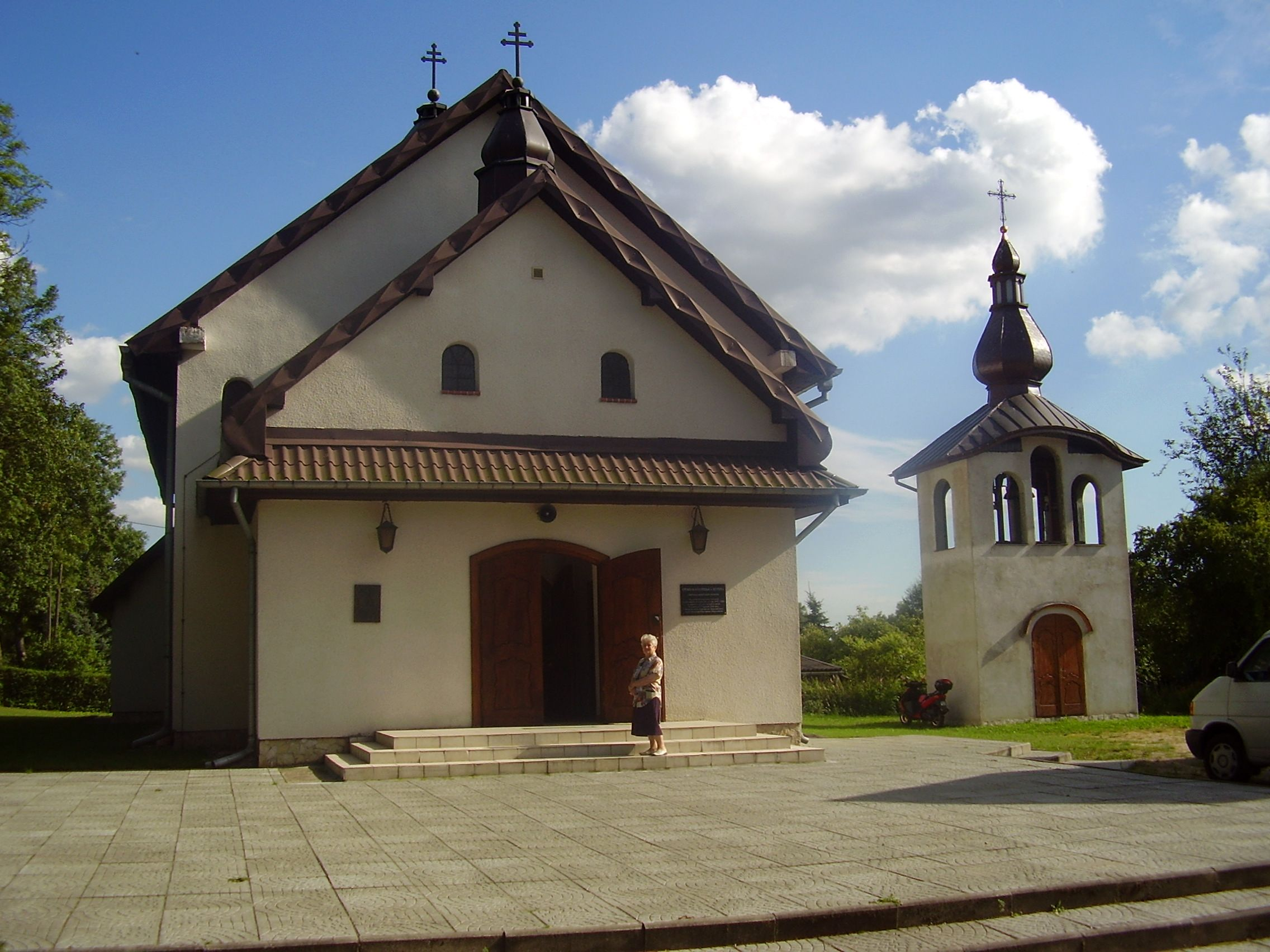 Morąg - cerkiew grekokatolicka p.w. św. Jerzego przy ul. Dąbrowskiego